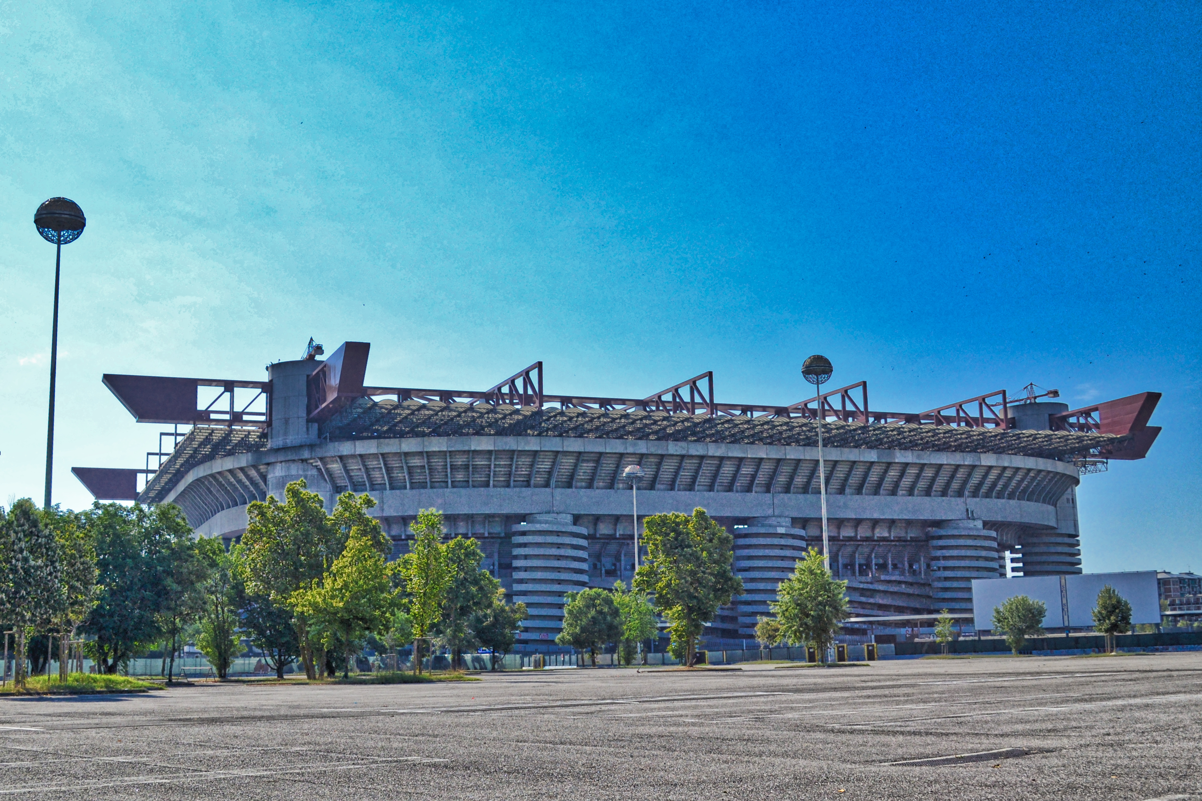 stadio Giuseppe Meazza This is a photo of a monument which is part of cultural heritage of Italy.